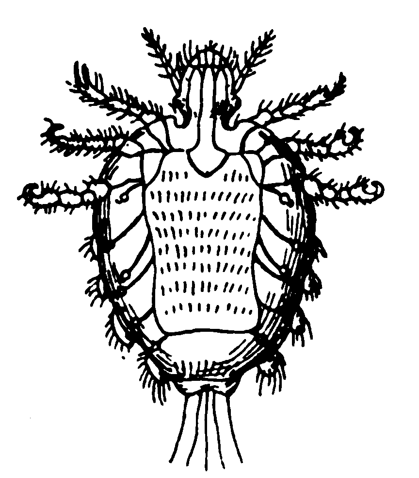 Pediculus pubis 50x